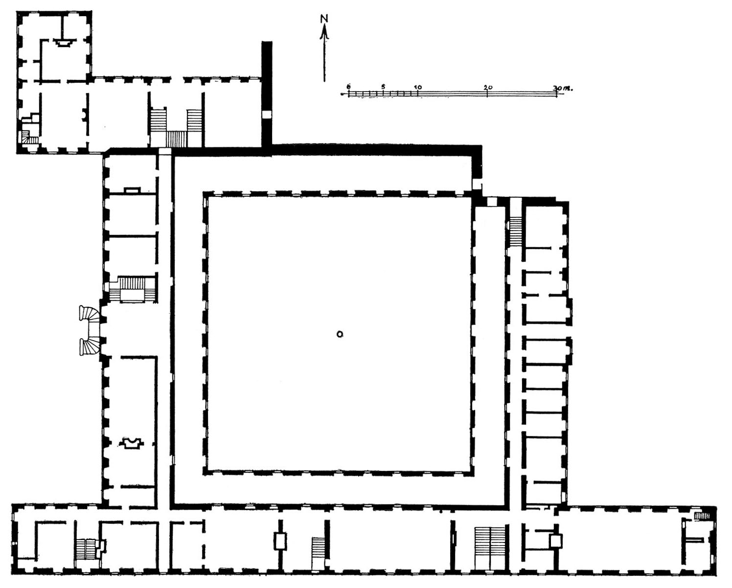 Grundriss der Klostergebäude im Kloster Marienfeld